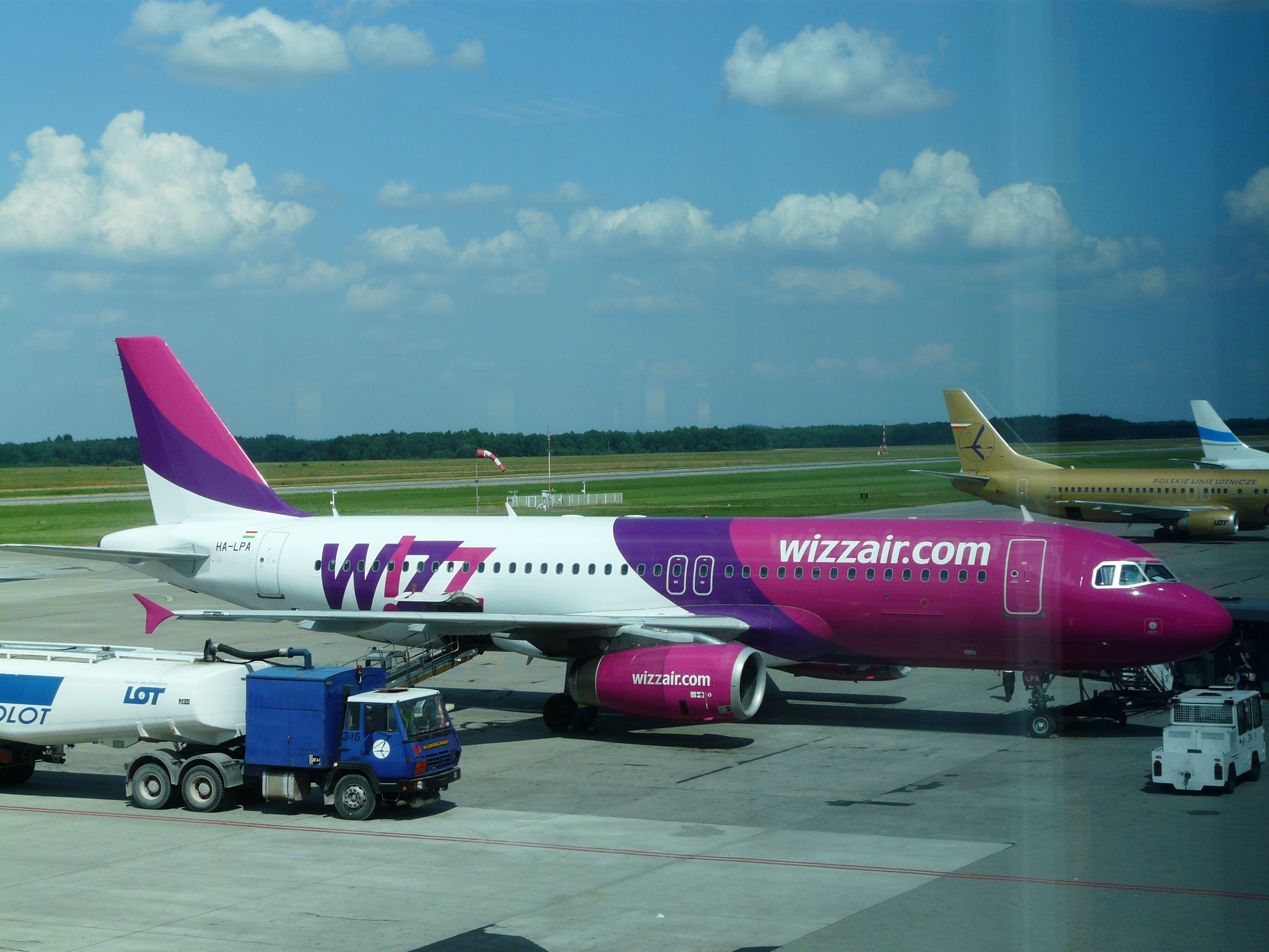 Katowice-Pyrzowice Airport